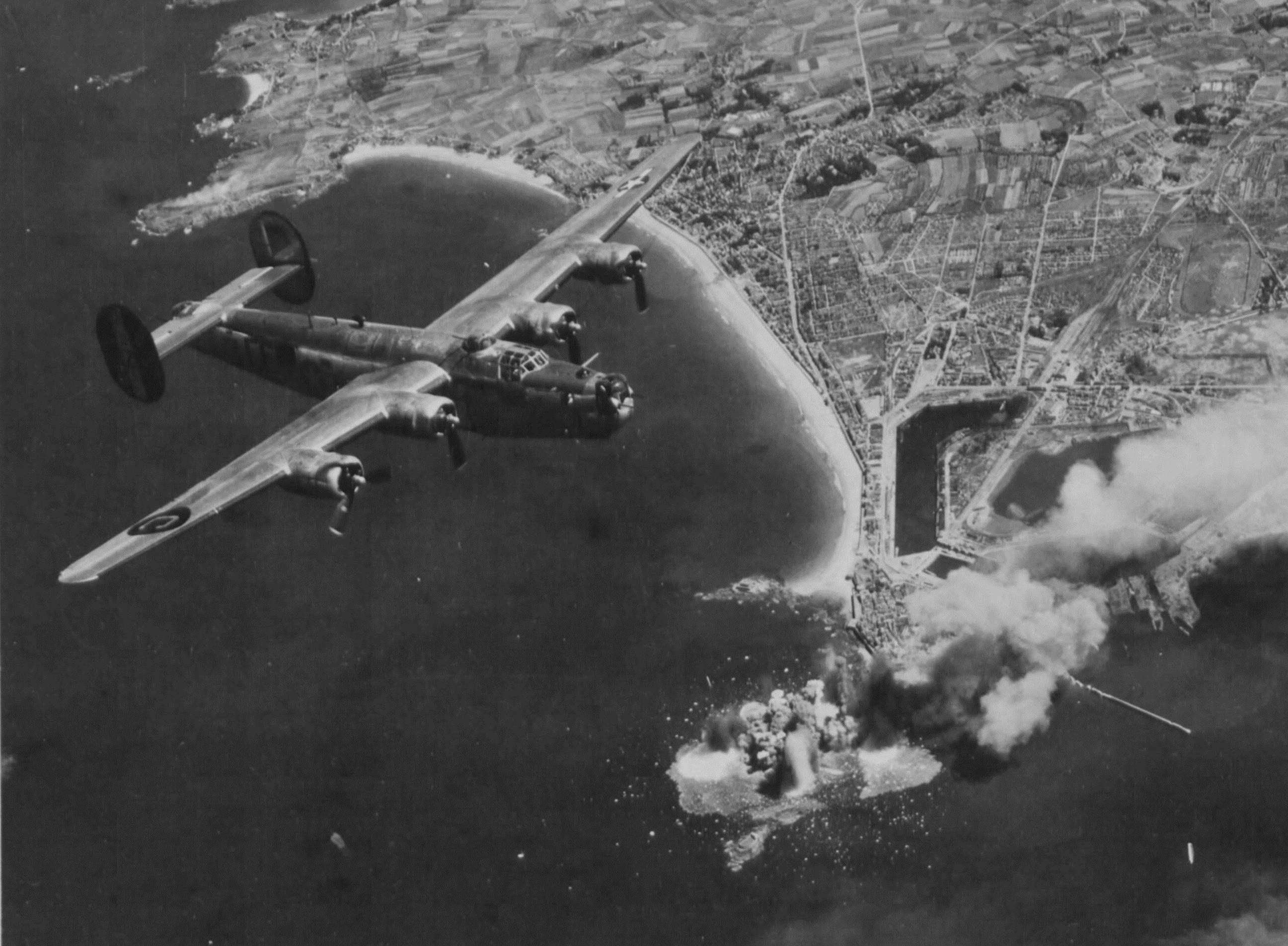 Bombardement du Grand Bé en août 1944 par des B-24 Liberator américains